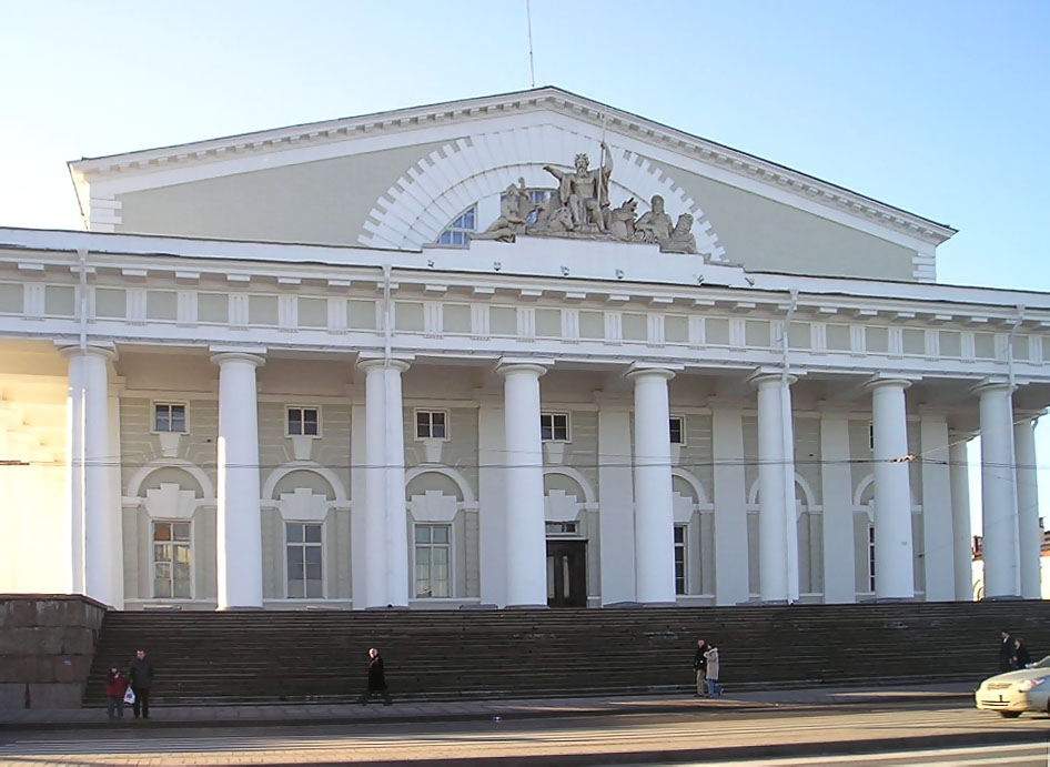 Navy Museum in Saint-Petersburg, Russia.